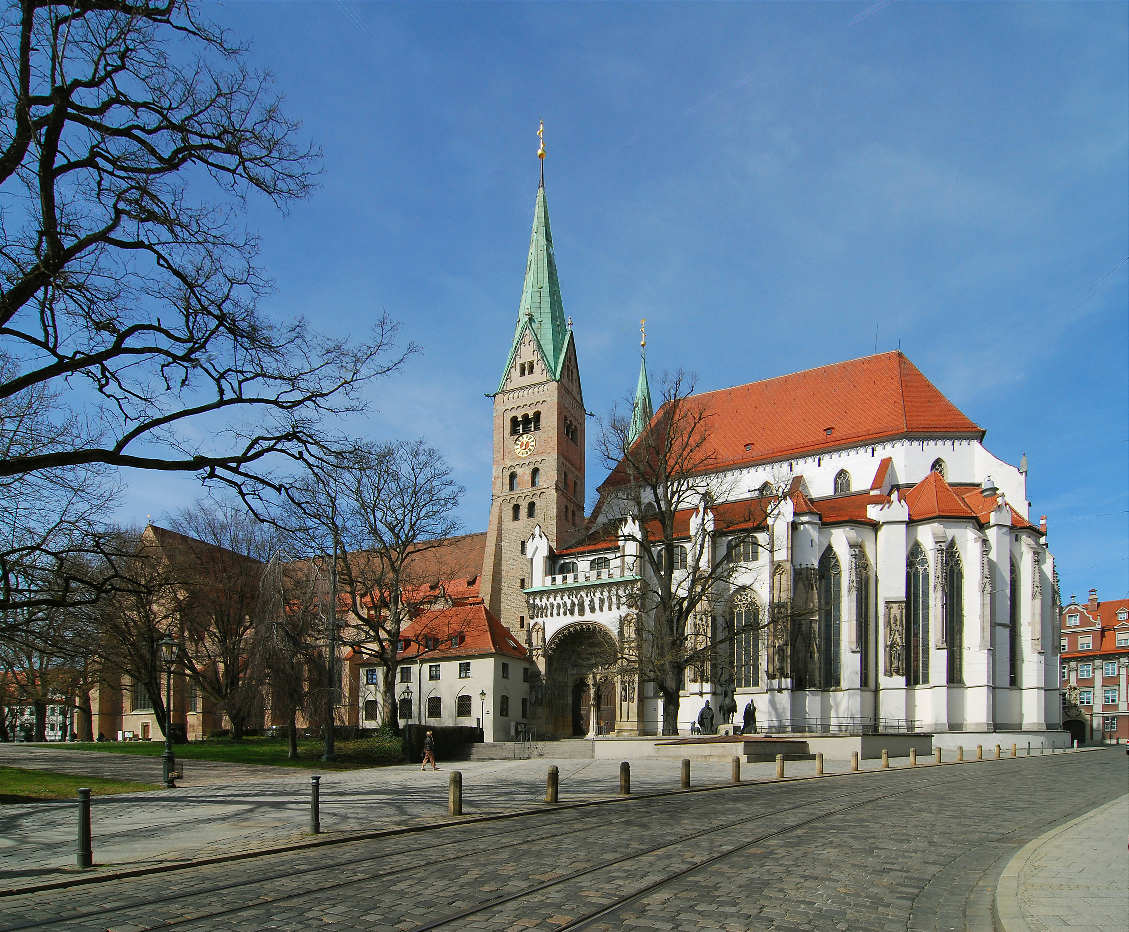 Die Hohe Domkirche Unserer Lieben Frau zu Augsburg ist die Kathedrale des Bistums und gleichzeitig die Stadtpfarrkirche der Dompfarrei zum Heiligen Herzen Jesu. Der Dom ist 113m lang und 40m breit. Seine Türme sind 62m hoch.